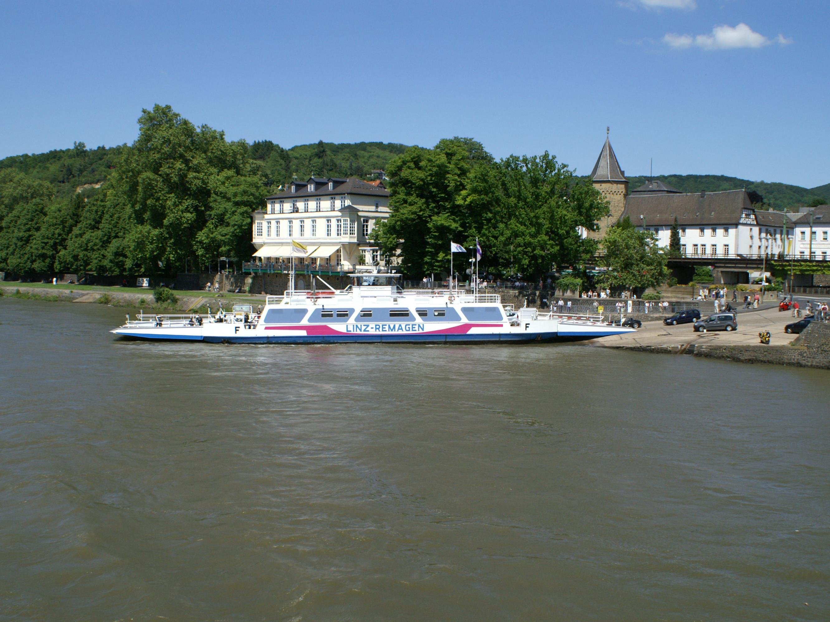 Rheinfähre Linz-Remagen am Anleger Linz am Rhein